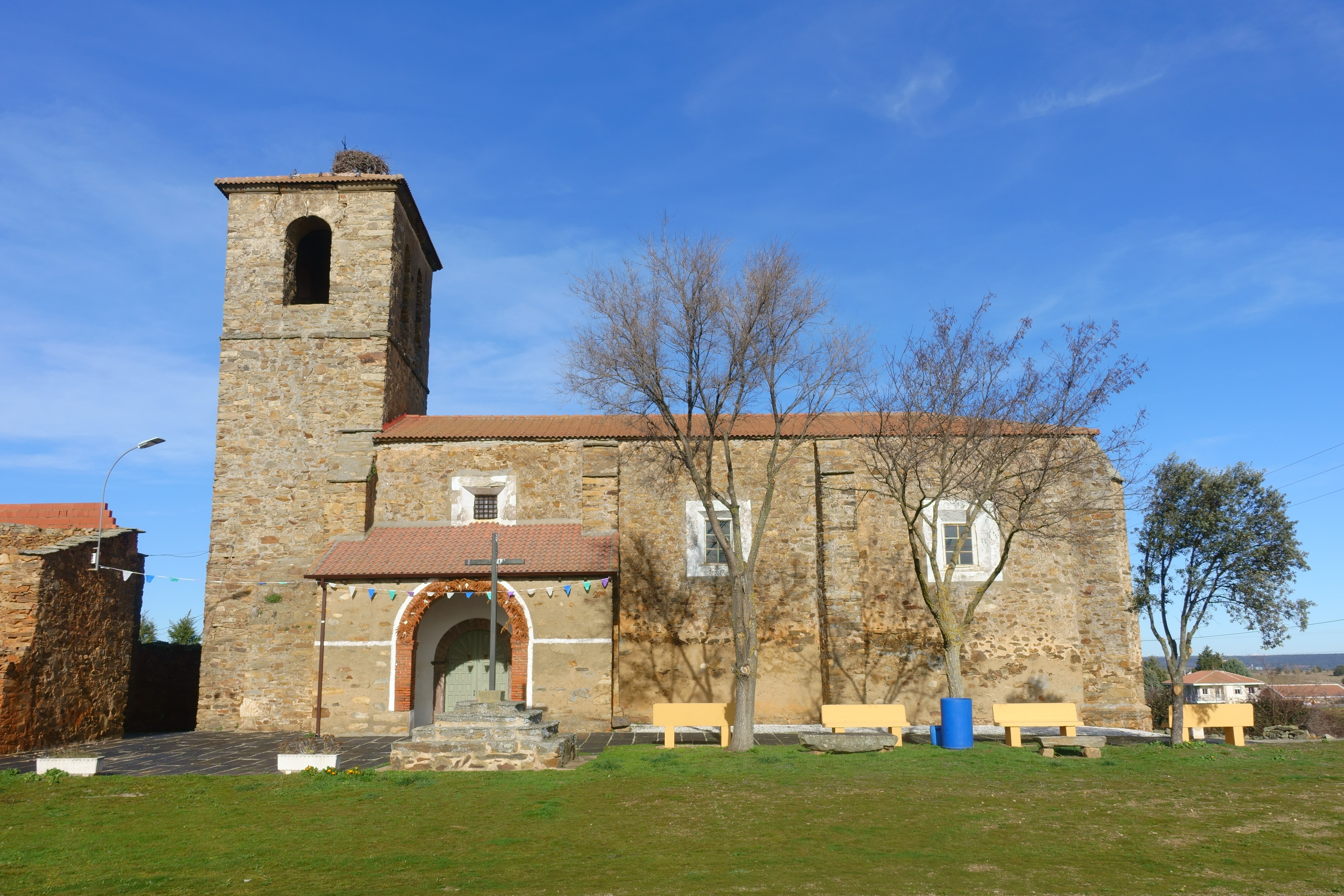 Iglesia de Nuestra Señora de la O, Valderrey (León, España).